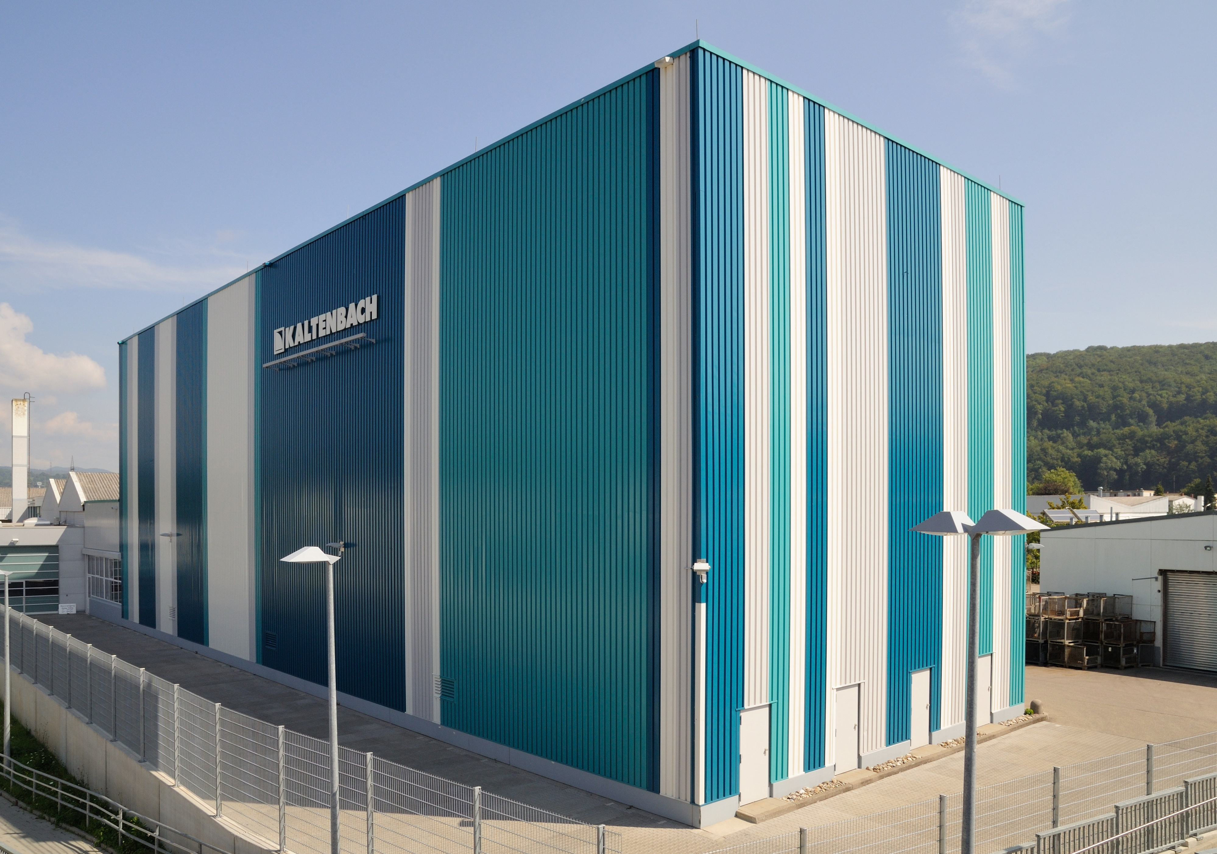 Lörrach: Gebäude der Firma Kaltenbach